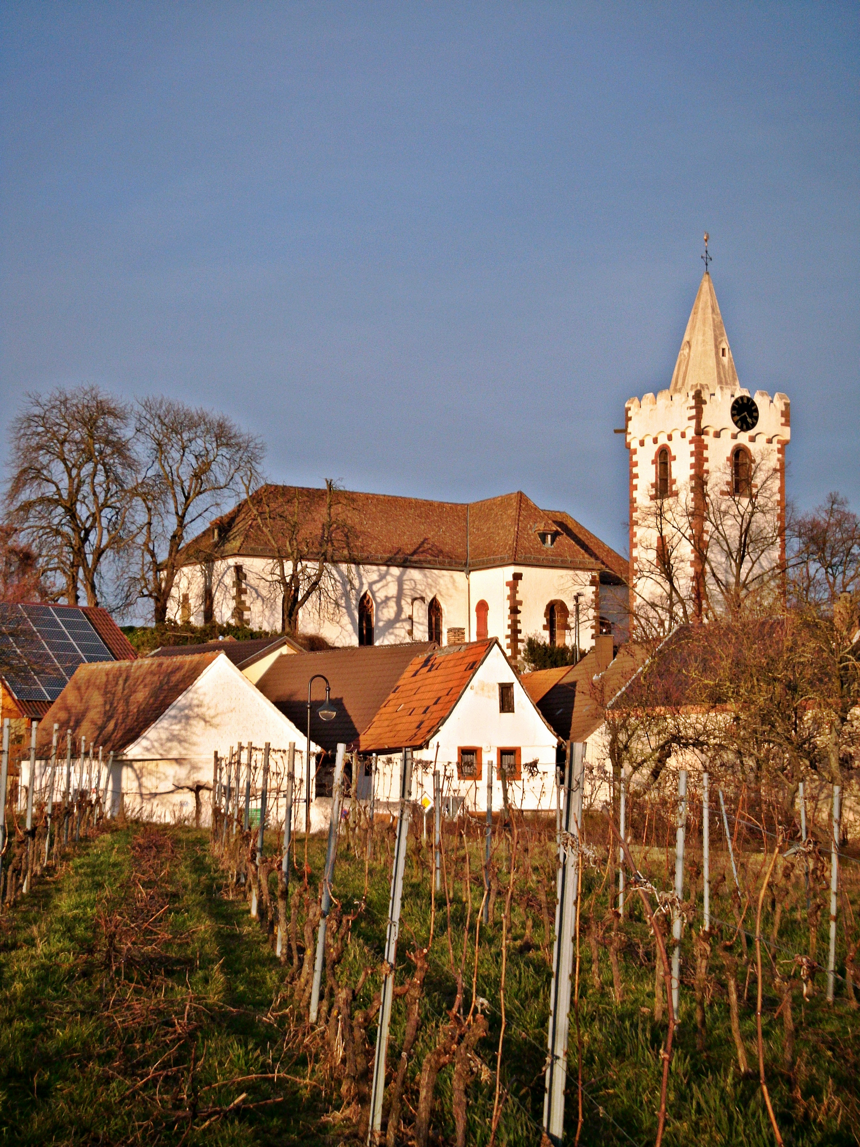 Martinskirche Kleinbockenheim, Bockenheim an der Weinstraße